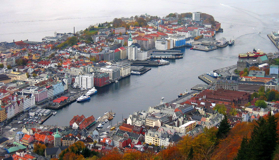 Bergen, Norway from Fløyen